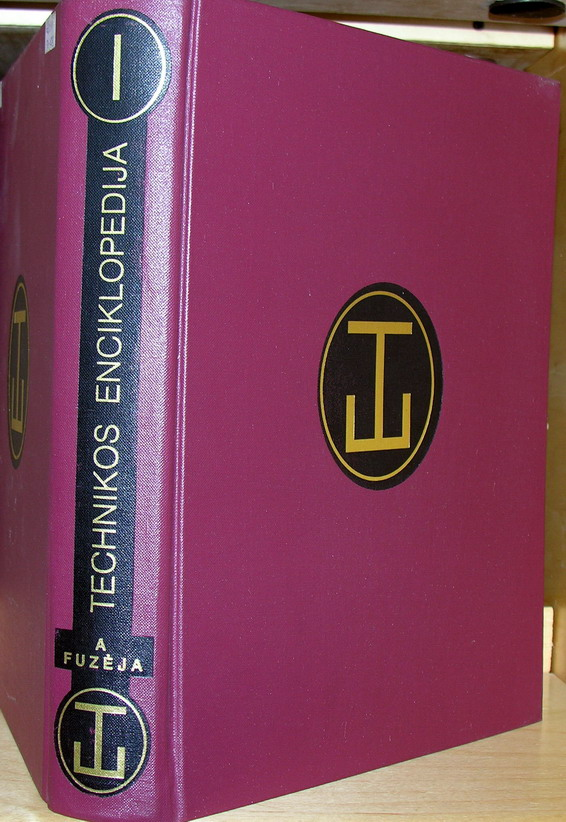 Technikos enciklopedija. Fotografavo: Algirdas, 2006 m. gegužės 3 d.